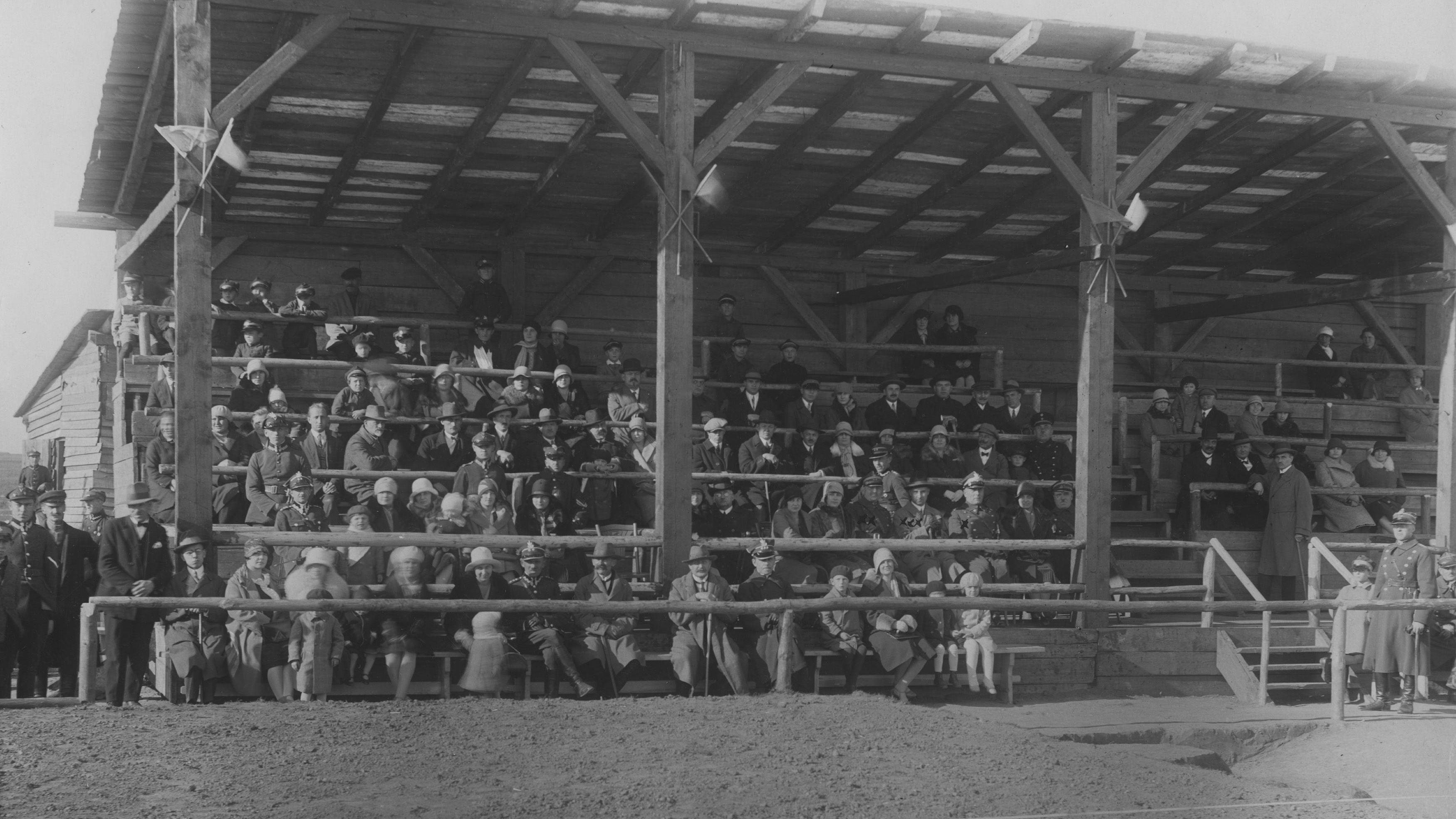 Mecz piłki nożnej w 4 pułku saperów w Sandomierzu. Widzowie na trybunach podczas meczu. W drugim rzędzie od prawej siedzą: NN, NN, gen. Tadeusz Kutrzeba, wojewoda Władysław Rozmarynowski, ppłk Henryk Bagiński. Koncern Ilustrowany Kurier Codzienny - Archiwum Ilustracji. Sygnatura: 1-W-1708-1